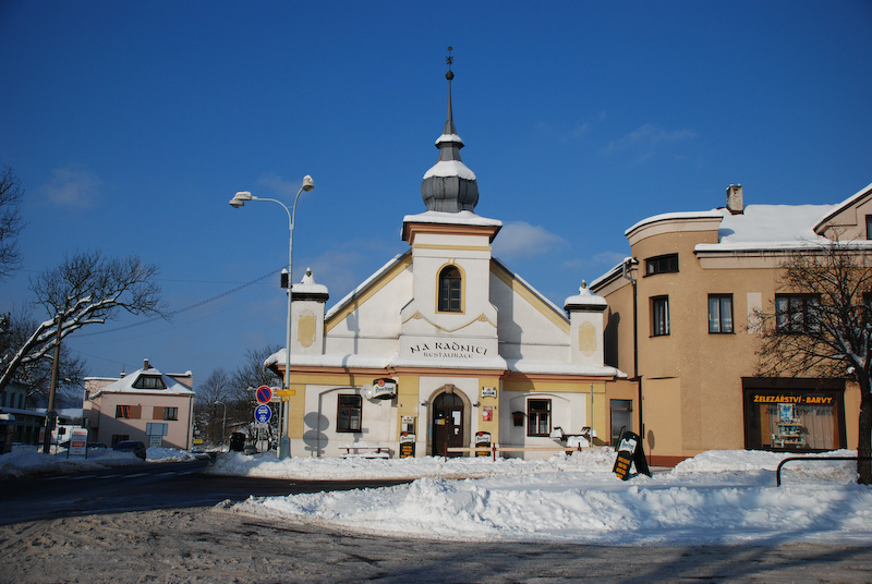 Radnice na náměstí v Trhové Kamenici